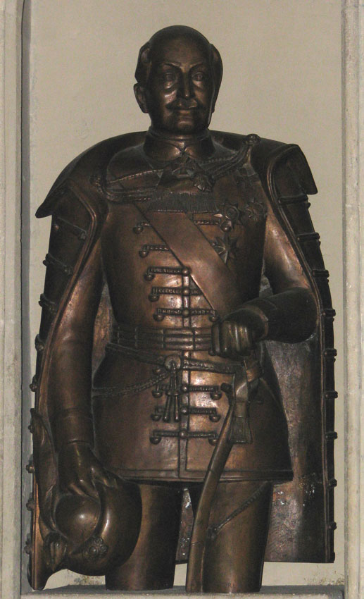 Kip bana Josipa Jelačića u Zagrebačkoj katedrali